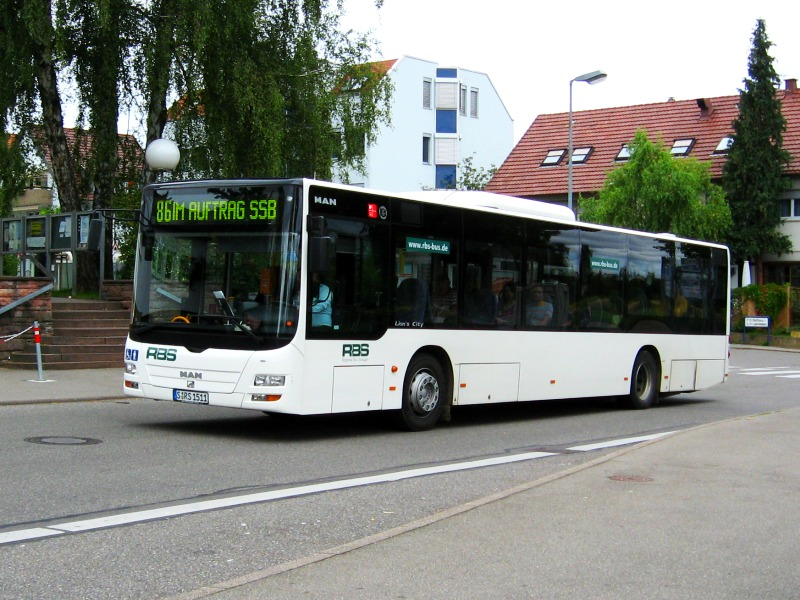 MAN Lion's City, RBS, Leinfelden Bahnhof